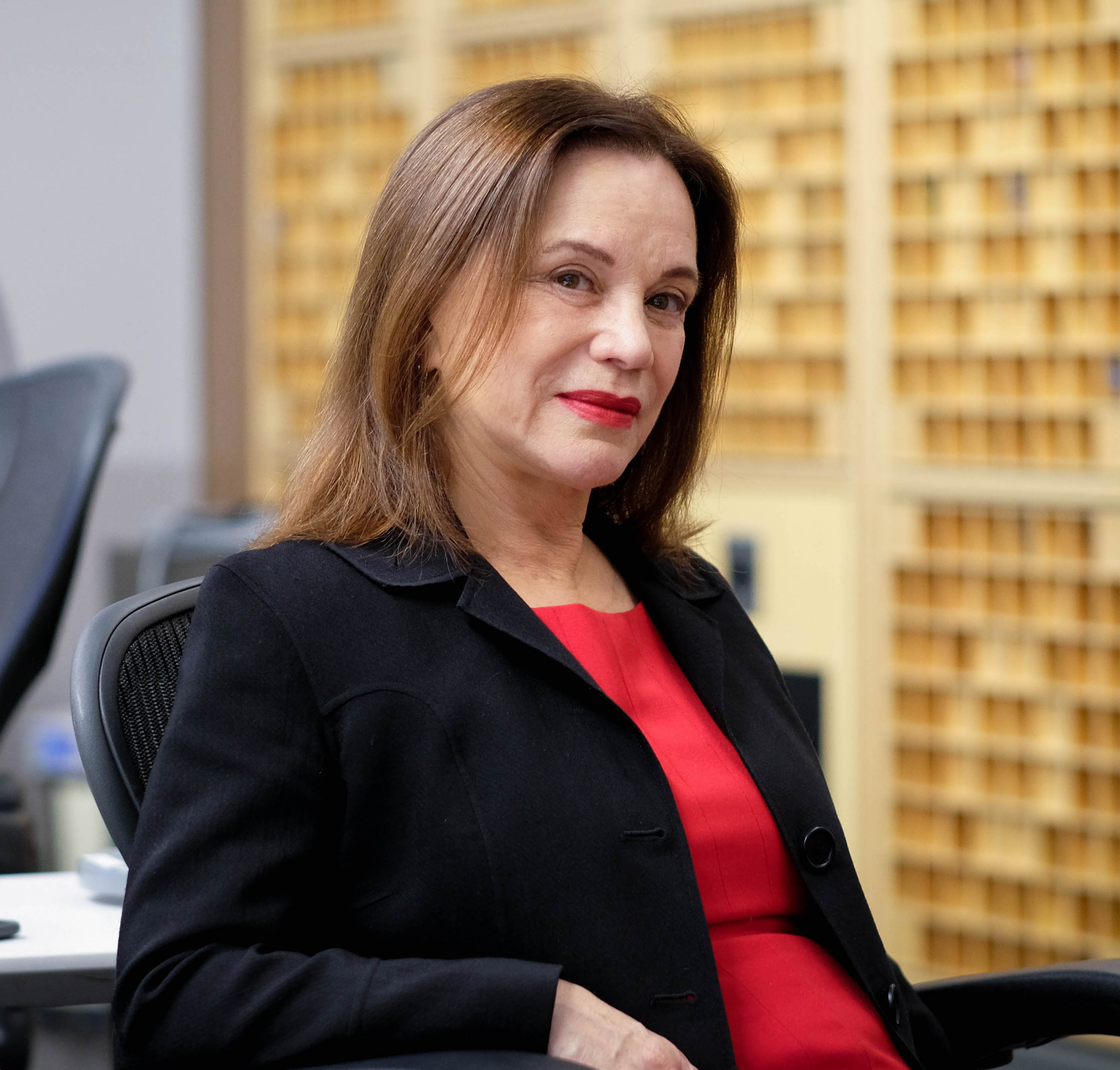 一个可以适用于不同情况的肖像照